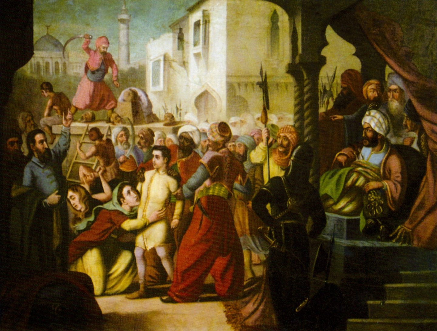 Uciderea brancovenilor